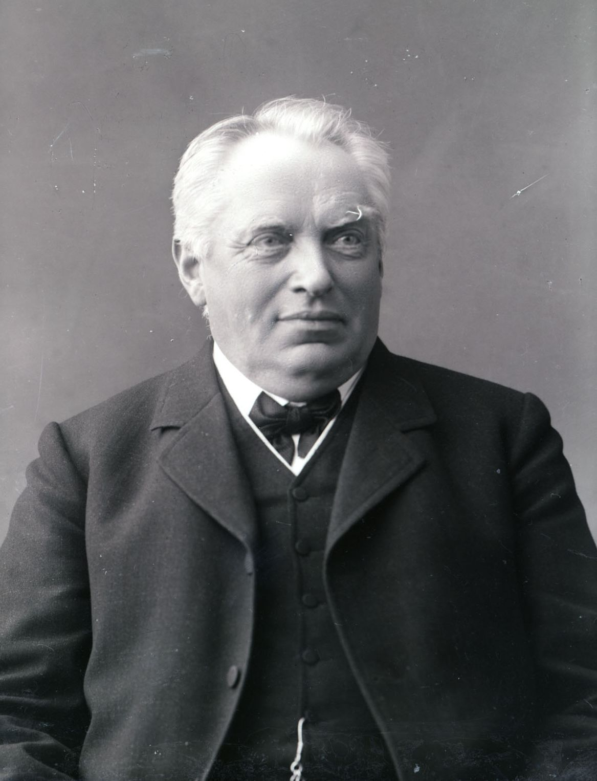 Bernhard Øverland, offisielt portrett fra Stortinget.